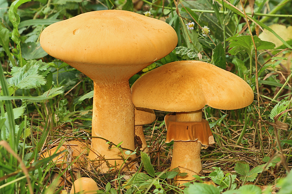 Phaeolepiota aurea